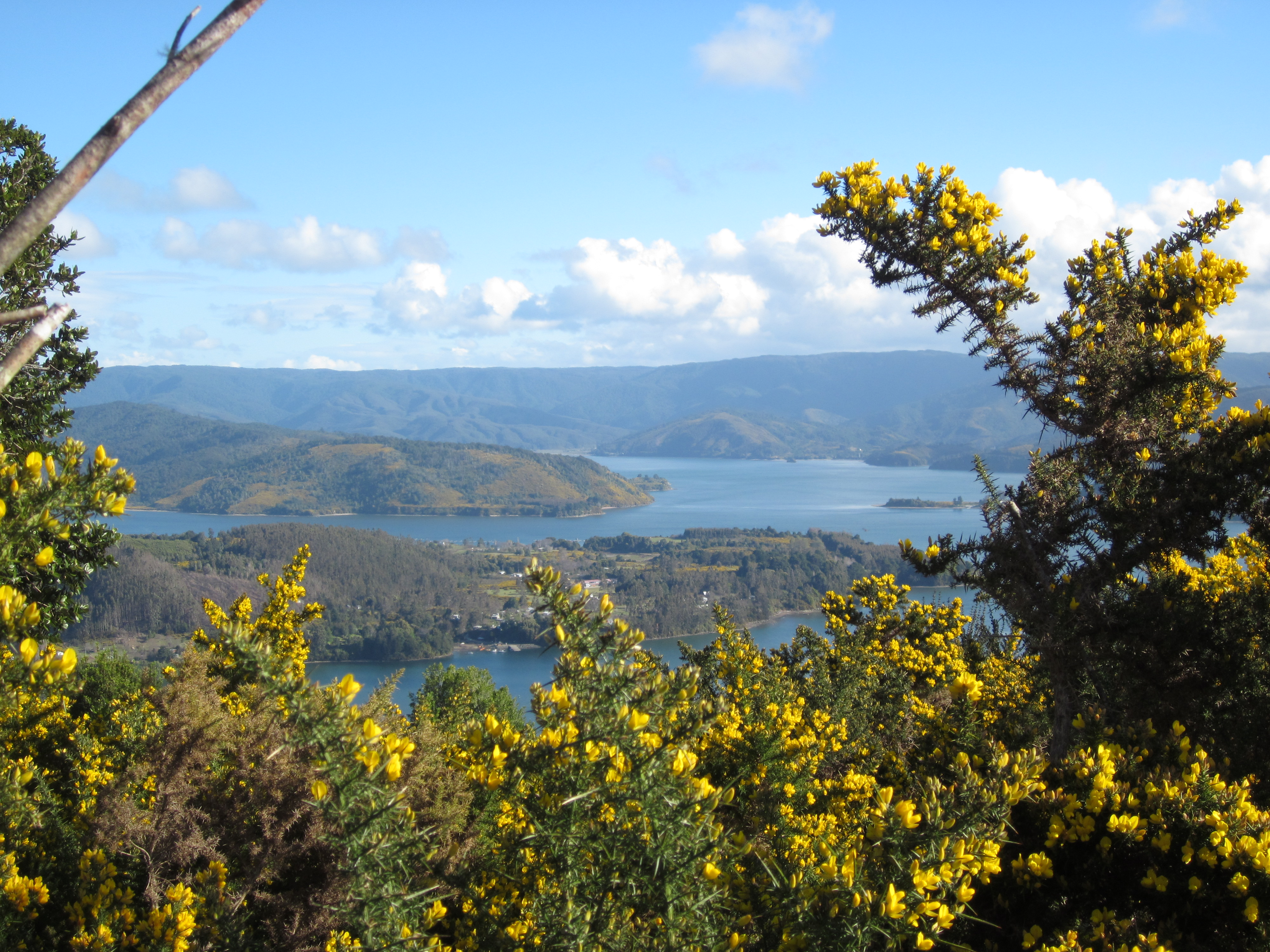 Paisaje de Ulex en la bahía de Corral, Niebla y la isla del Rey. January 2014.